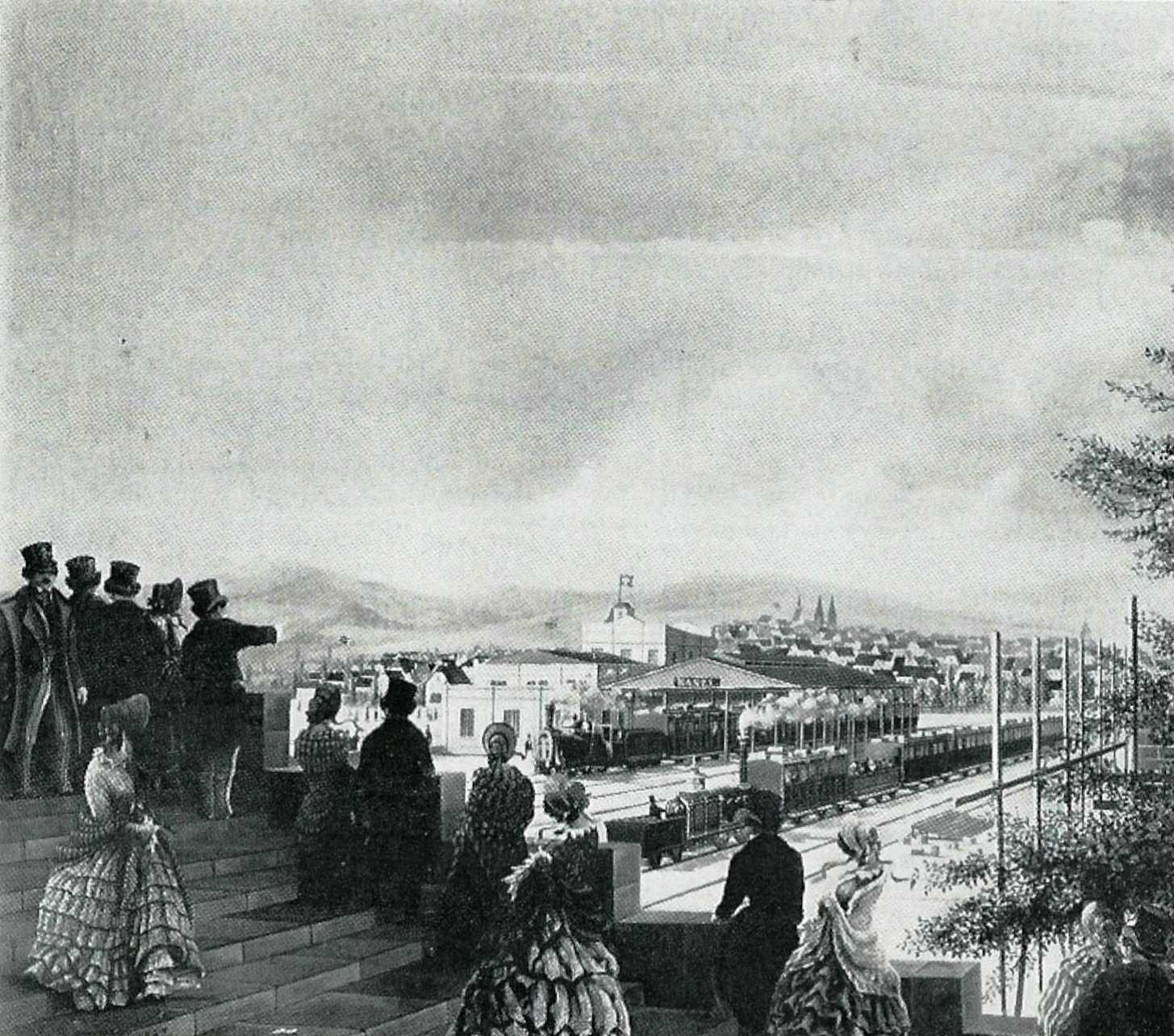 Arrivée des premiers trains en gare (gare alsacienne extra-muros) de Bâle (1844-45)